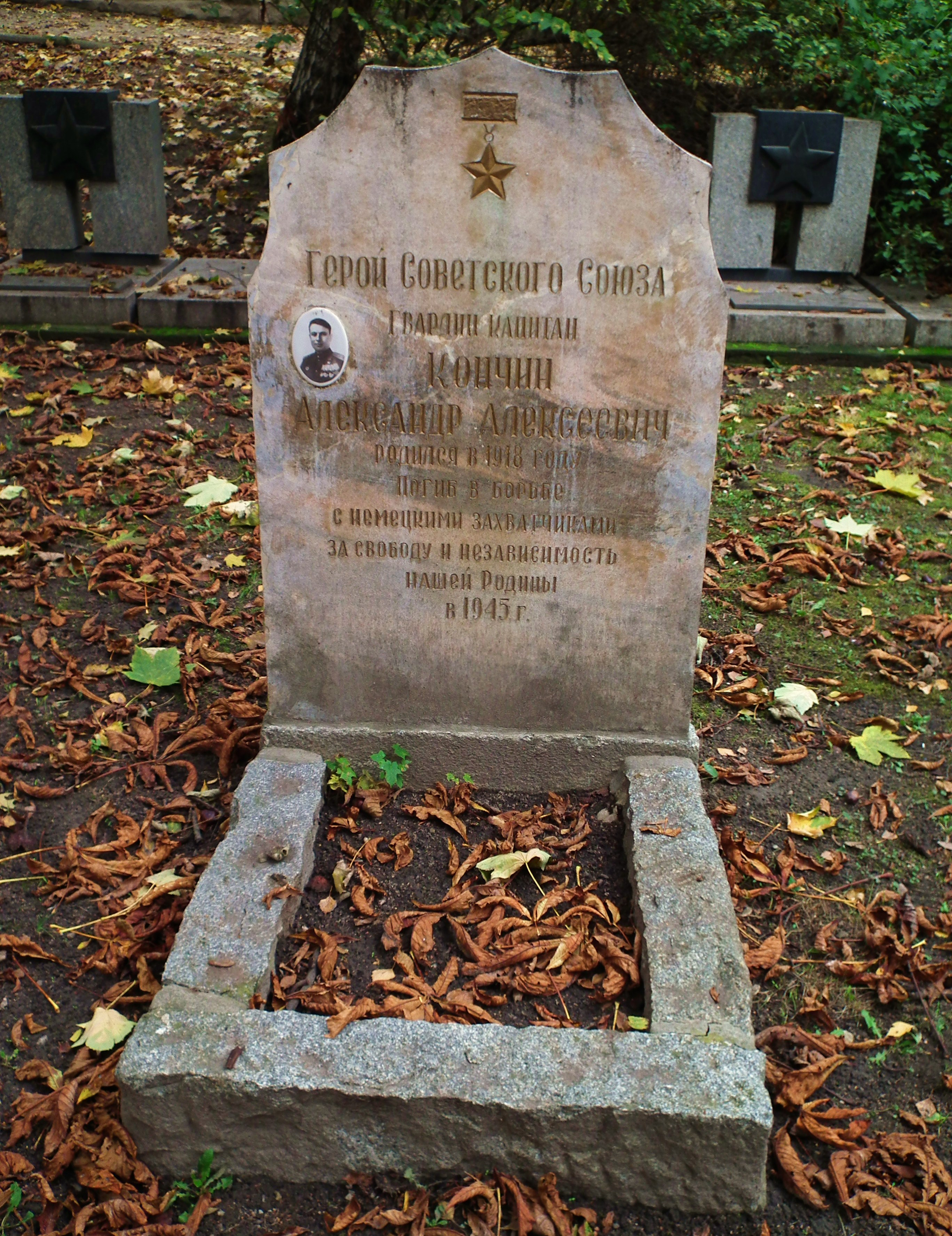 Grób Aleksandra Konczina na Cytedeli w Poznaniu.